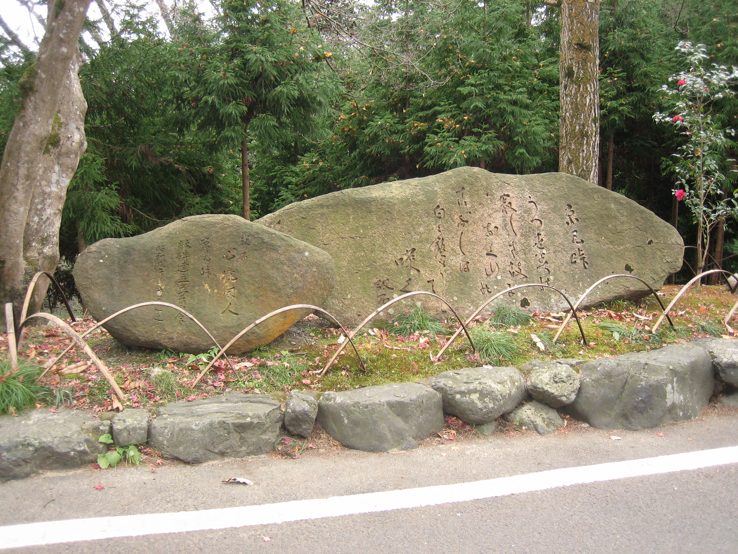 京見峠に置かれた石碑を撮影